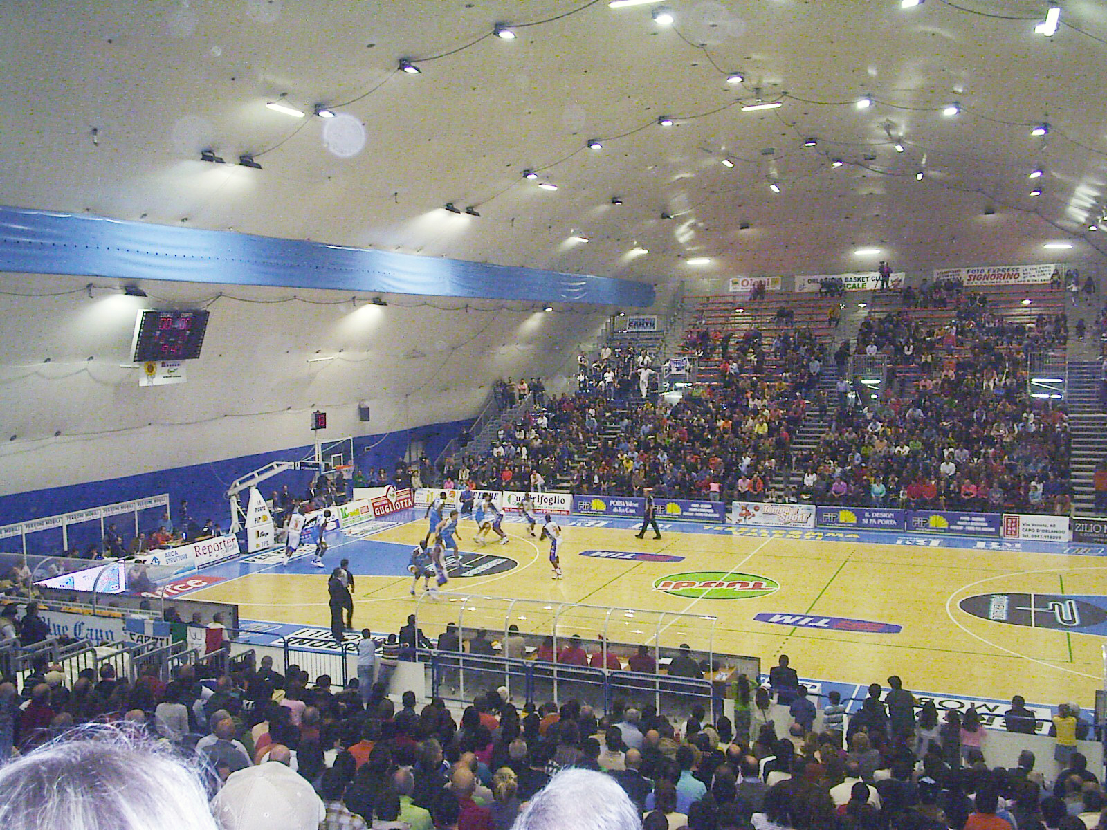 Orlandina-Cantù Legabasket A stagione 2006-2007